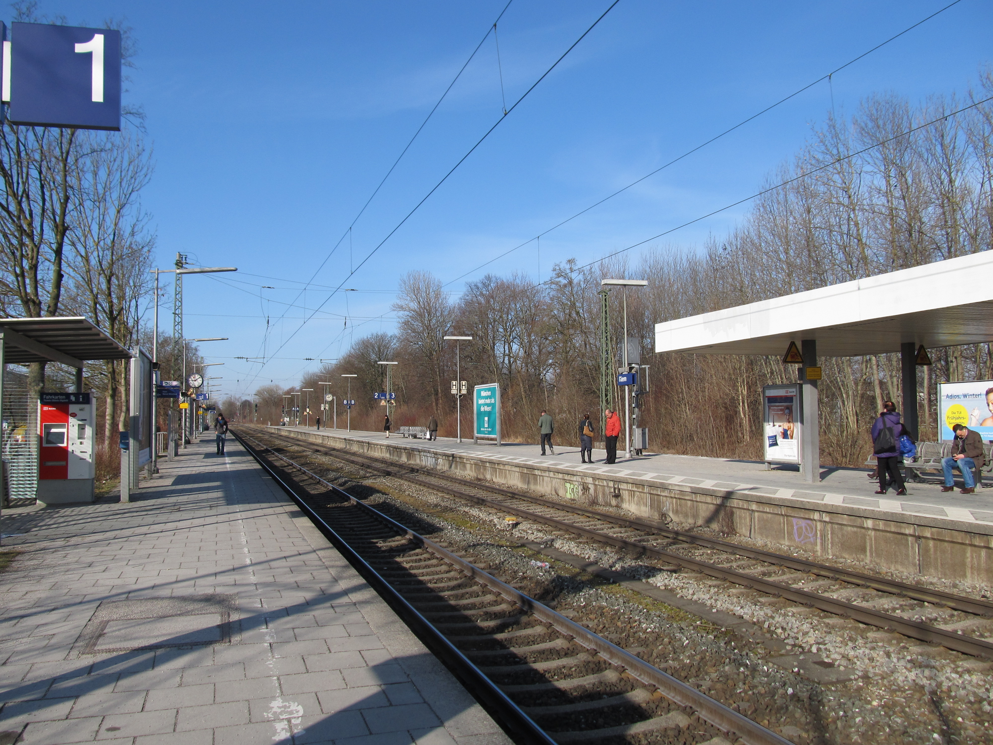 Bahnsteige des Bahnhofes München-Riem